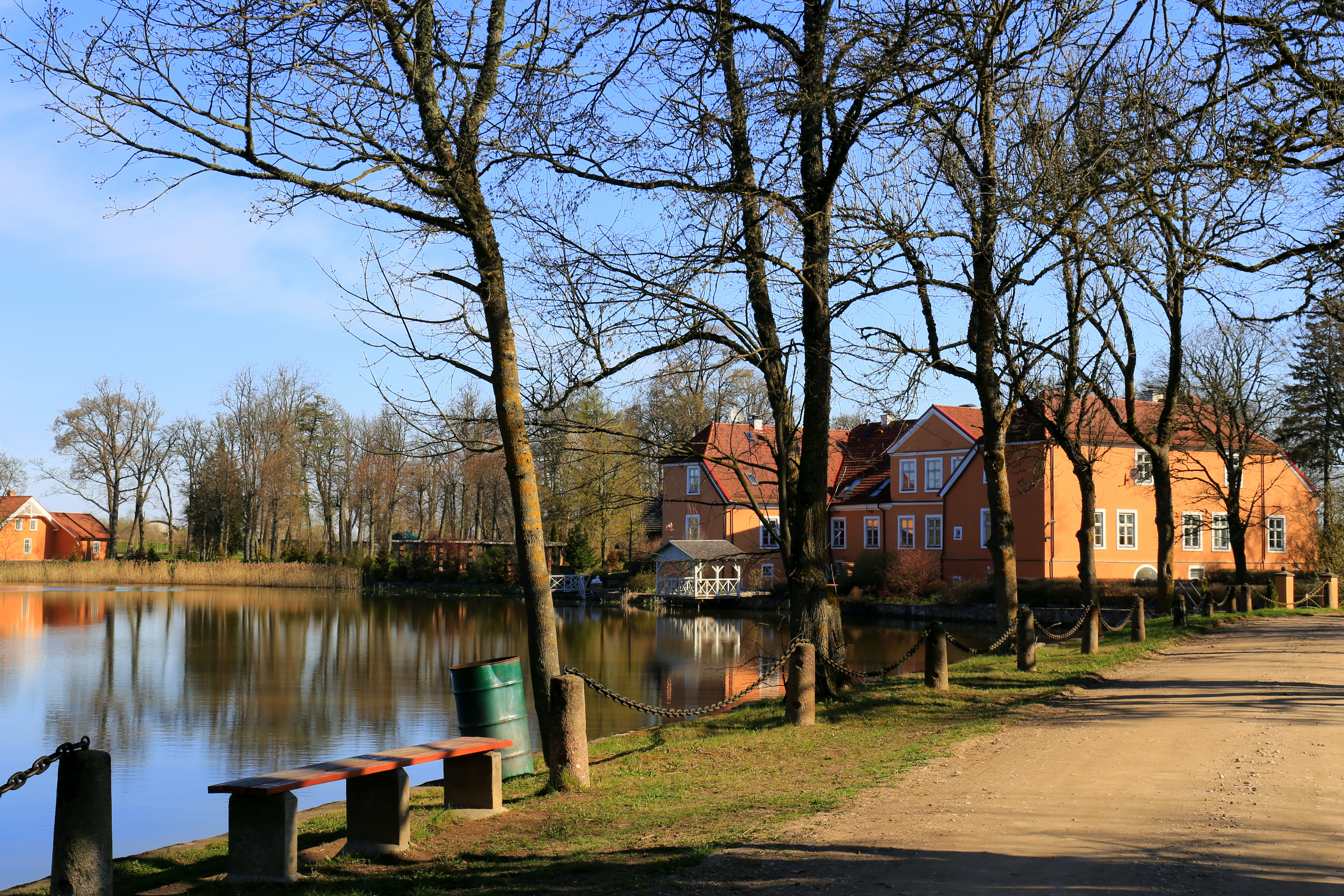 Kukšu muiža / manor